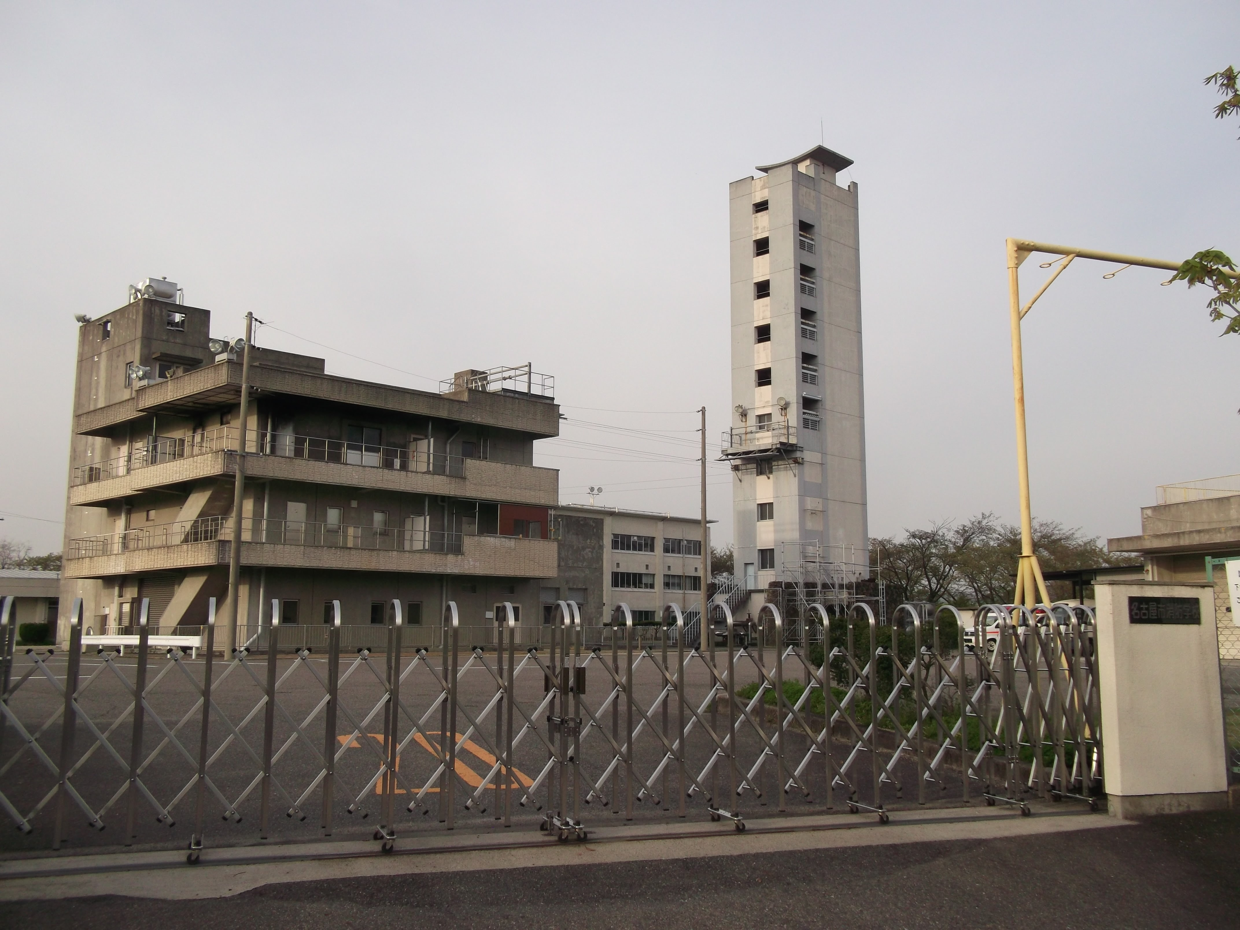 名古屋市守山区下志段味の名古屋市消防学校